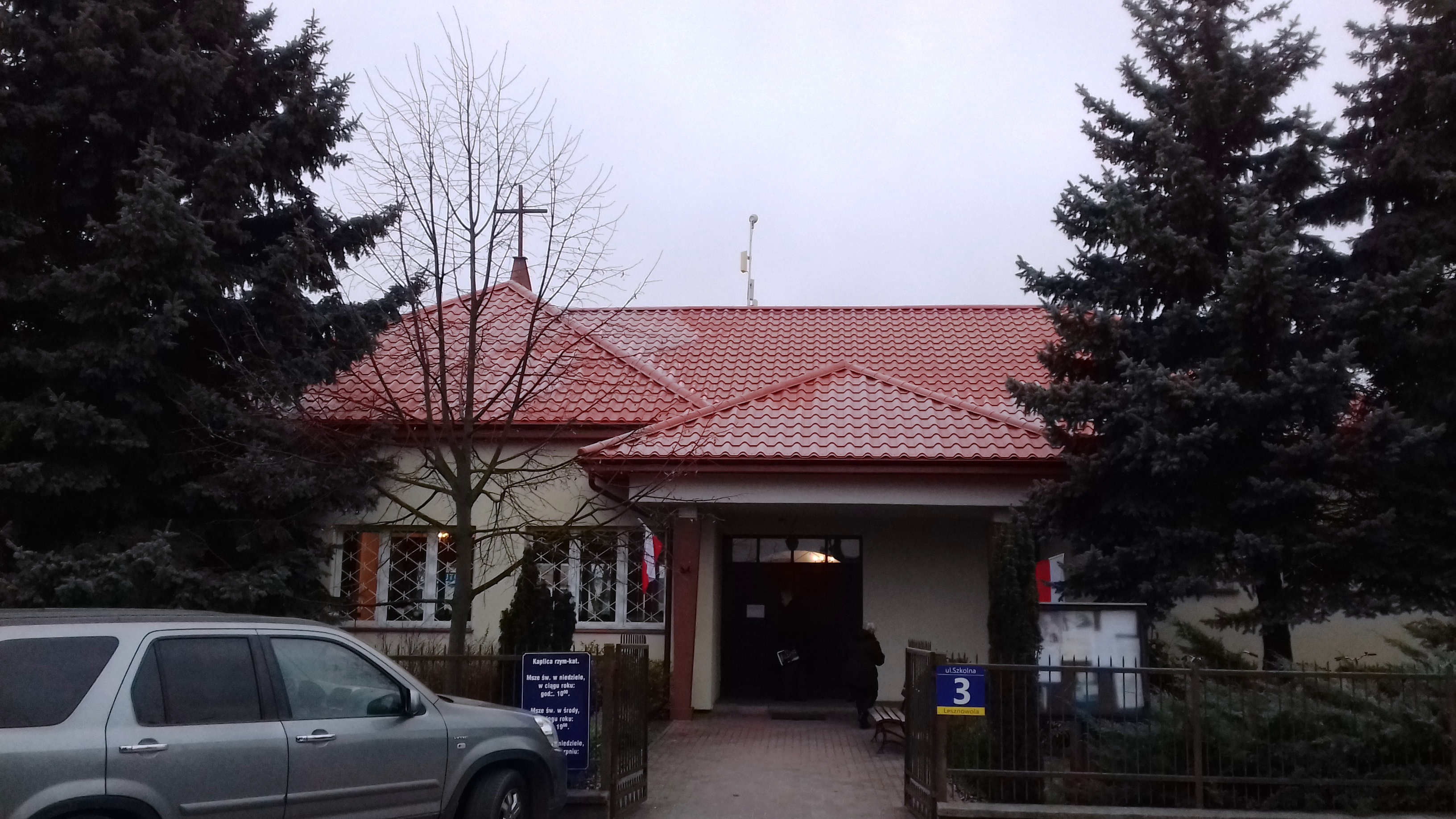 Lesznowola (gm. Lesznowola, pow. Piaseczno) - kaplica